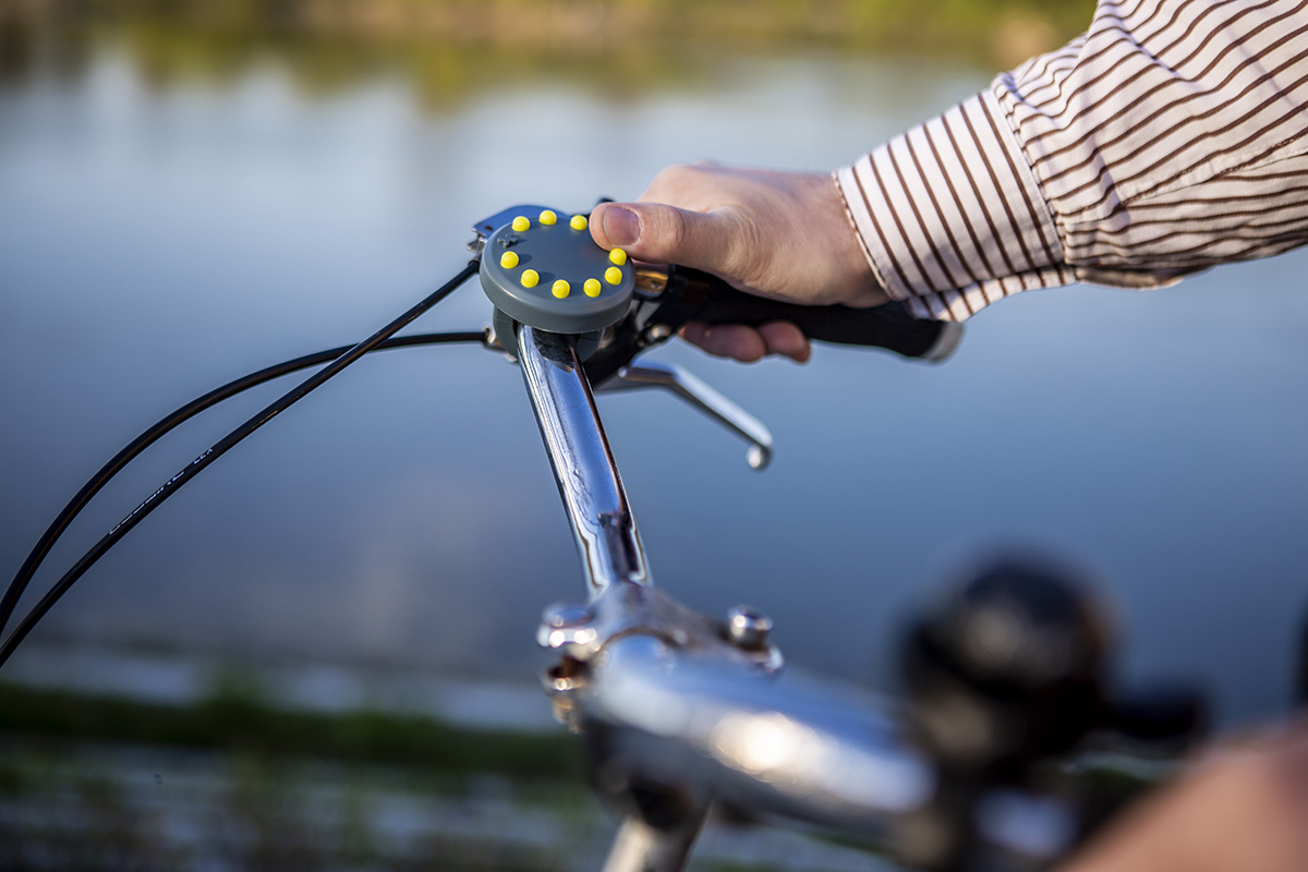 Różaniec rowerowy b-Rose